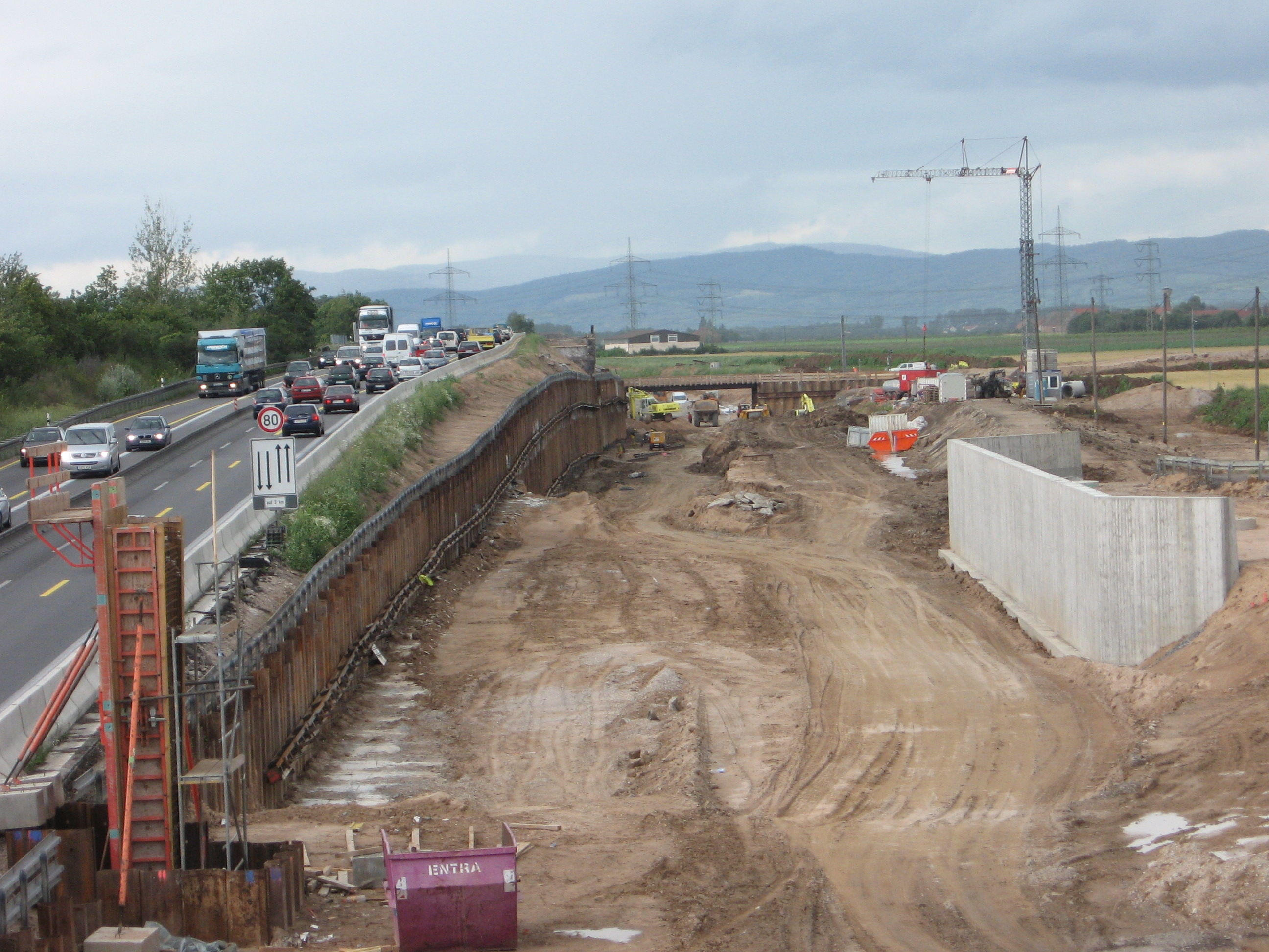 Tieferlegung der A6 bei Mannheim aus Lärmschutzgründen. Links (noch) ursprünglicher Zustand, rechts bereits neue Höhe des Planums. Rechts bereits Lärmschutzwälle incl. Stützwand erkennbar. Lärmschutzwände fehlen noch. In diesem Bereich Lärmschutzanlagen bis zu einer Höhe von 10m über der Fahrbahn.